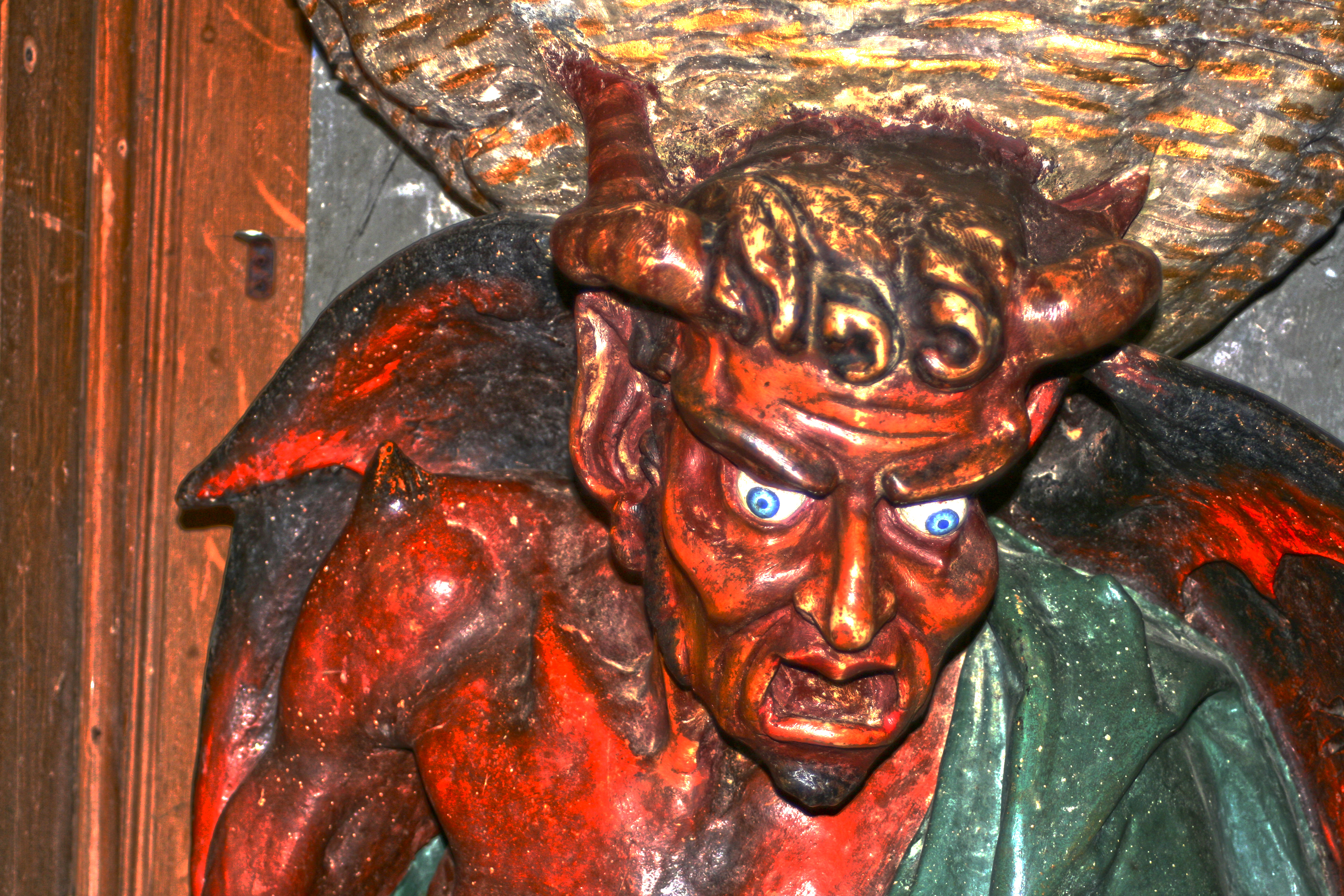 Asmodeo Rennes-le-Château (Francia) France